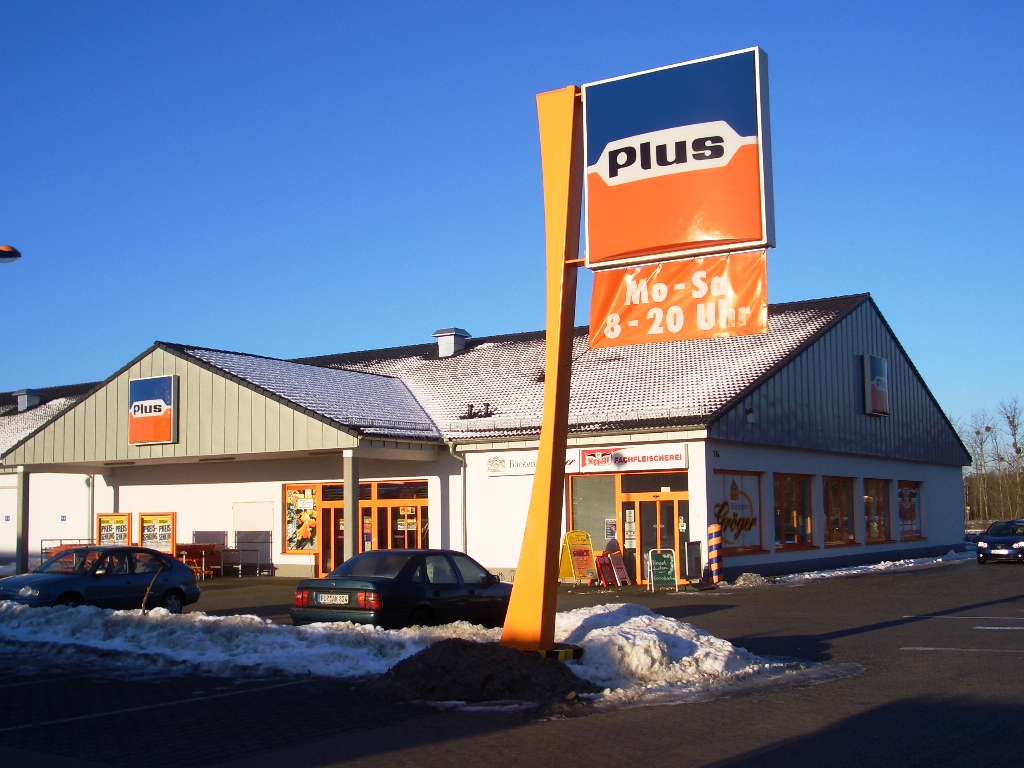 PLUS Discounter in Pirna Äußere Pillnitzer Straße